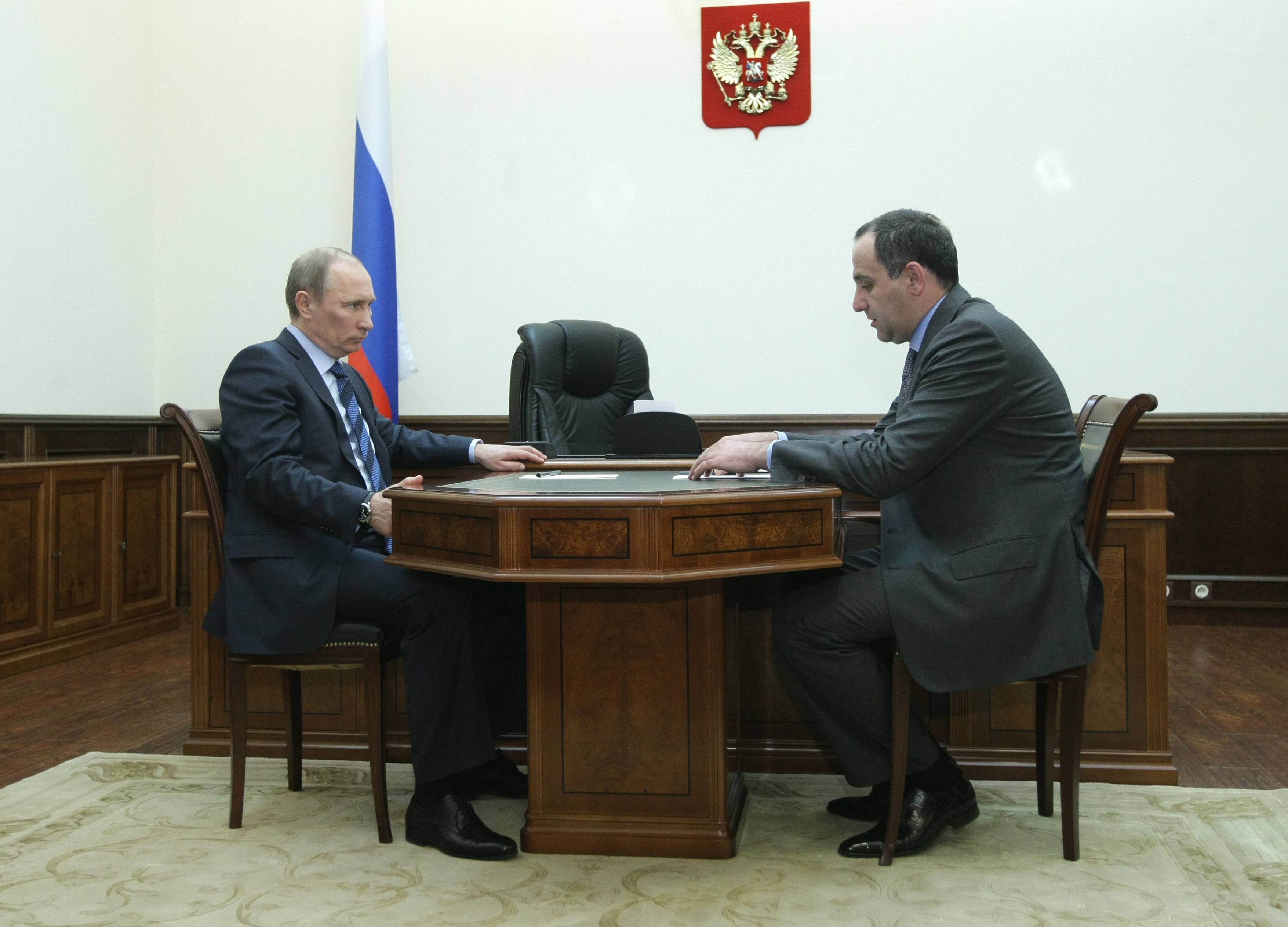 Рабоча встреча Председателя Правительства Российской Федерации В. В. Путина с президентом Карачаево-Черкесской Республики Р. Б. Темрезовым